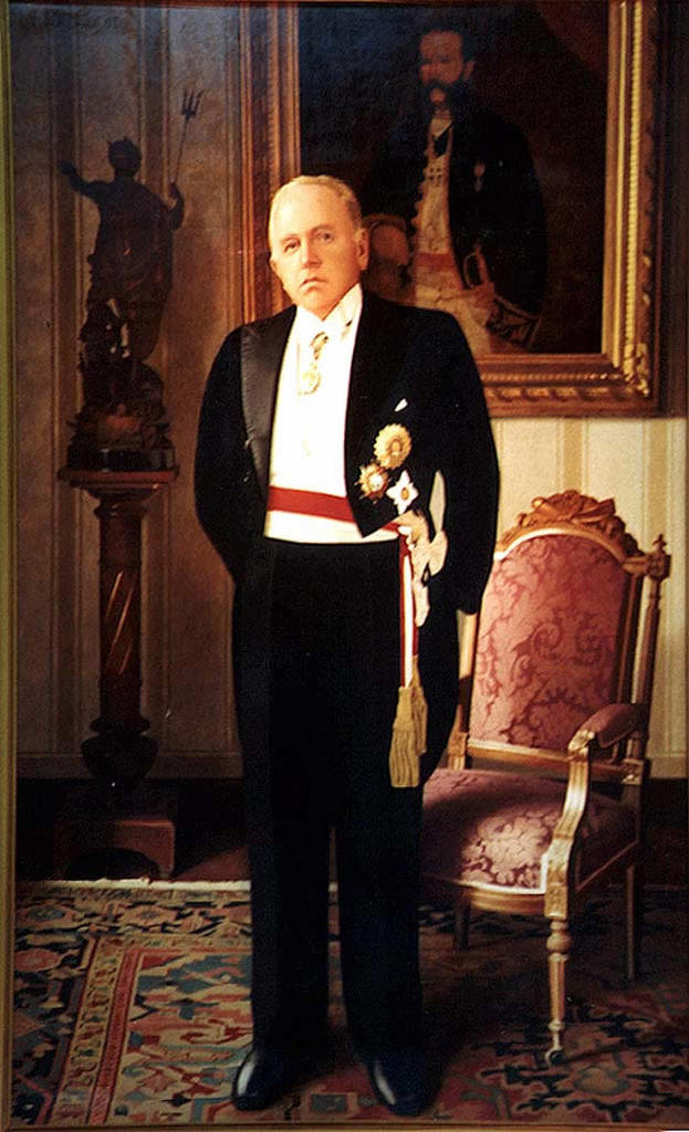 Raúl Porras Barrenechea como ministro de Estado.